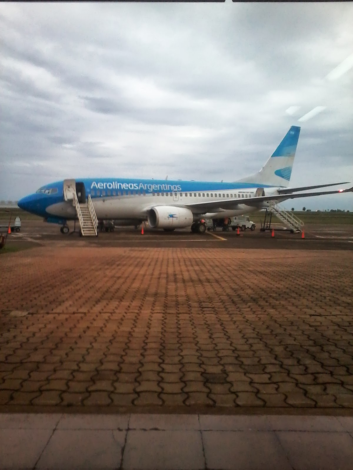 Un Boeing 737-700 utilizado en el vuelo AR1750 de Aerolíneas Argentinas operando la ruta Aeroparque (AEP) - Posadas (PSS), en Misiones.